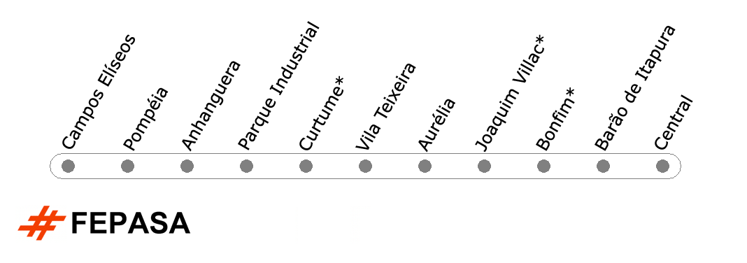 VLT Campinas